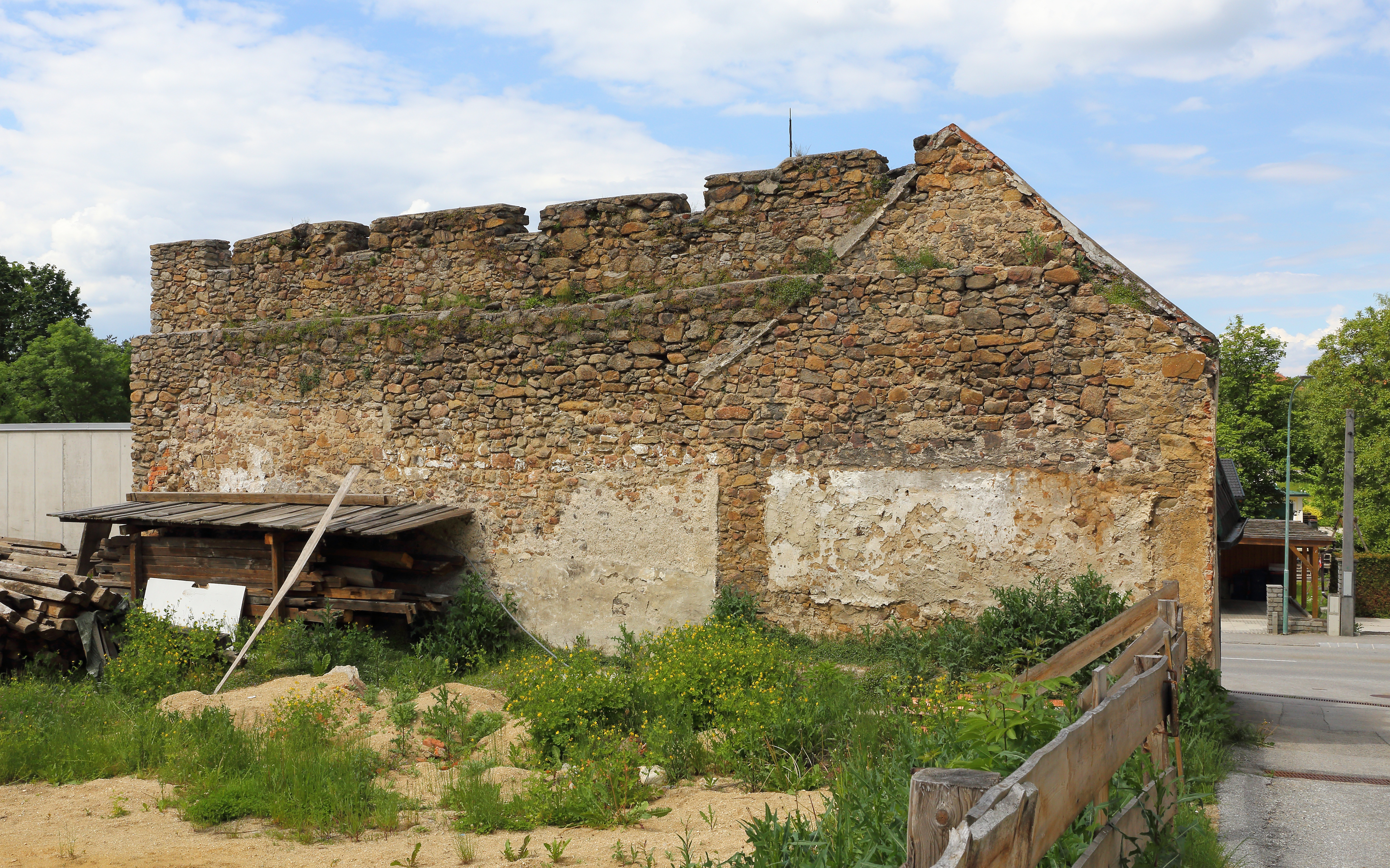 Stadtmauer in Gmünd Mühlgasse 16 (Rückseite) GstNr 126